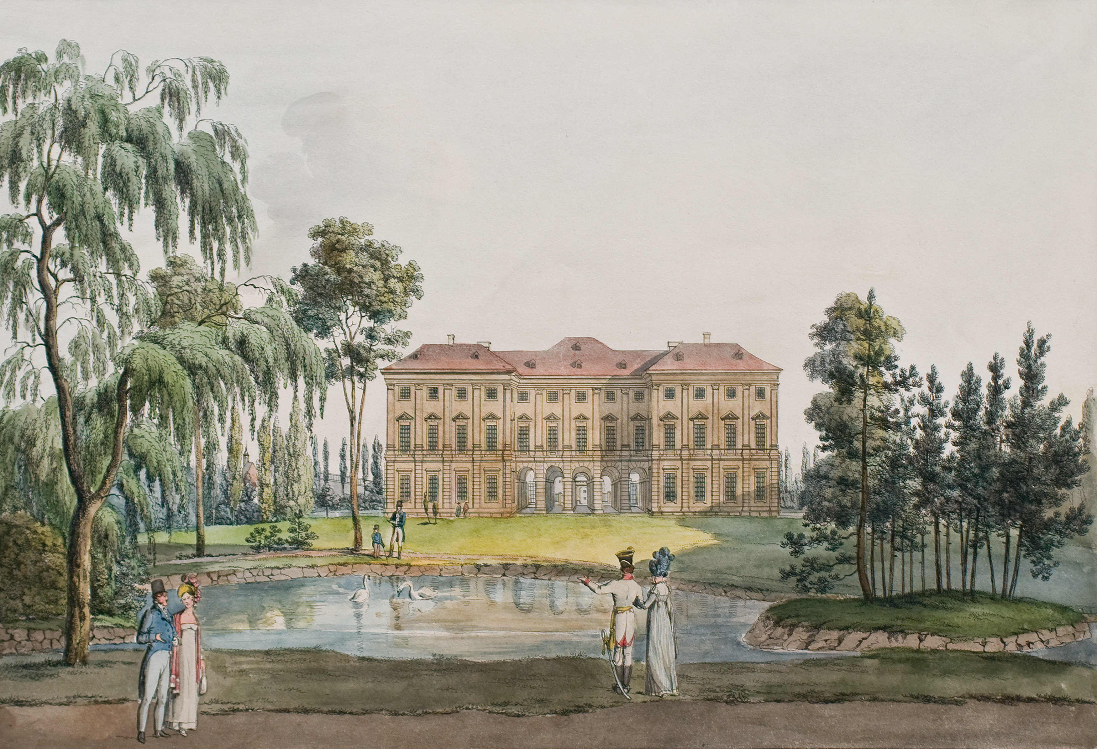 radiert von Johann Andreas Ziegler (1749–1802), verlegt von Artaria et Comp.